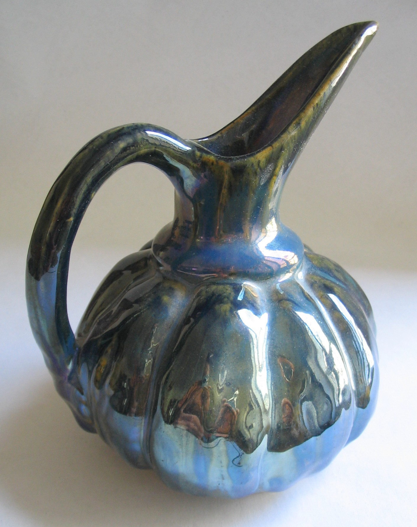 Pichet en grès à glaçure à lustre métallique. Alphonse Cytère, Rambervilliers, France, XIXe siècle.